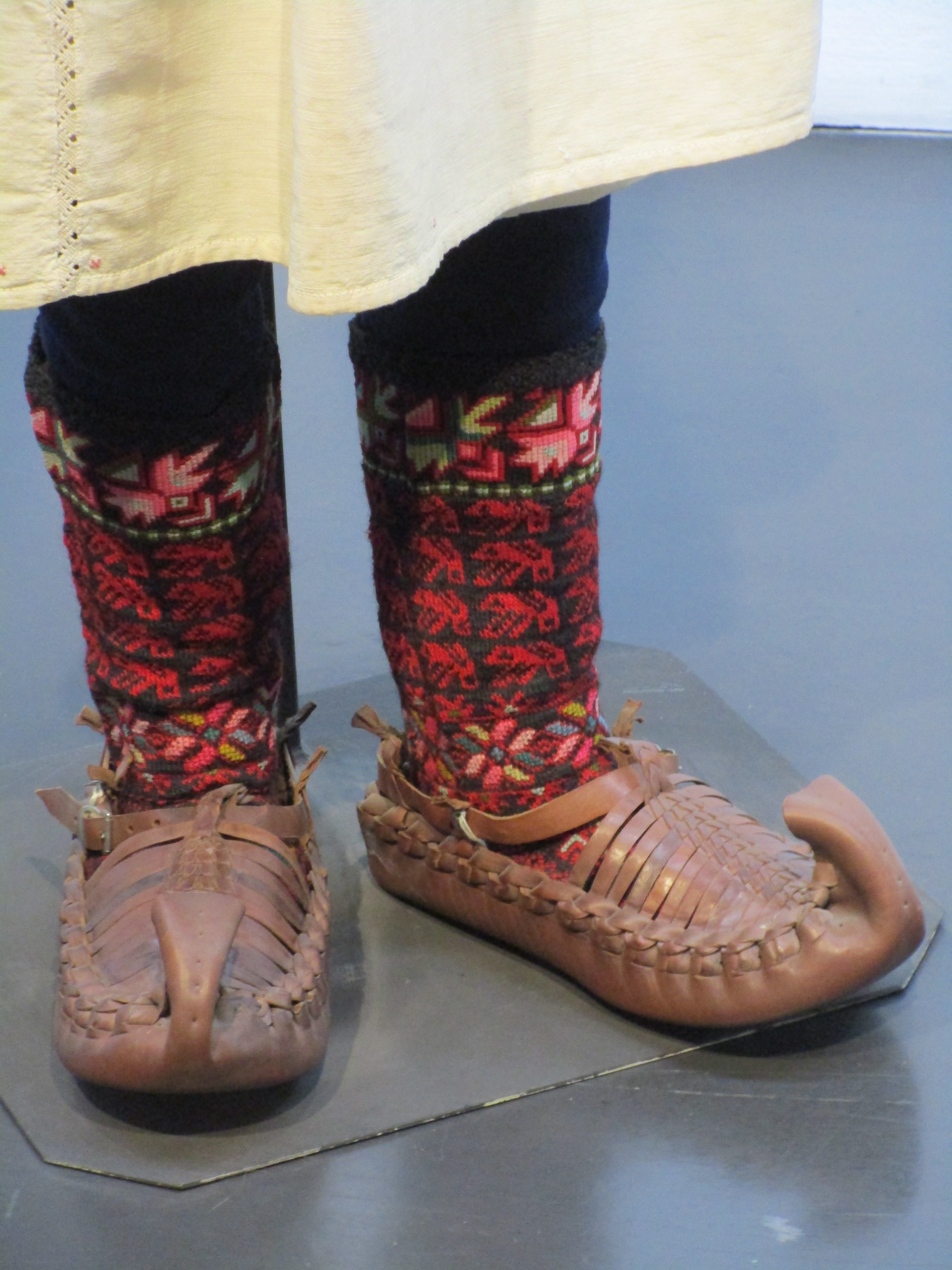 Srpski (latinica): Etnografski muzej, Beograd